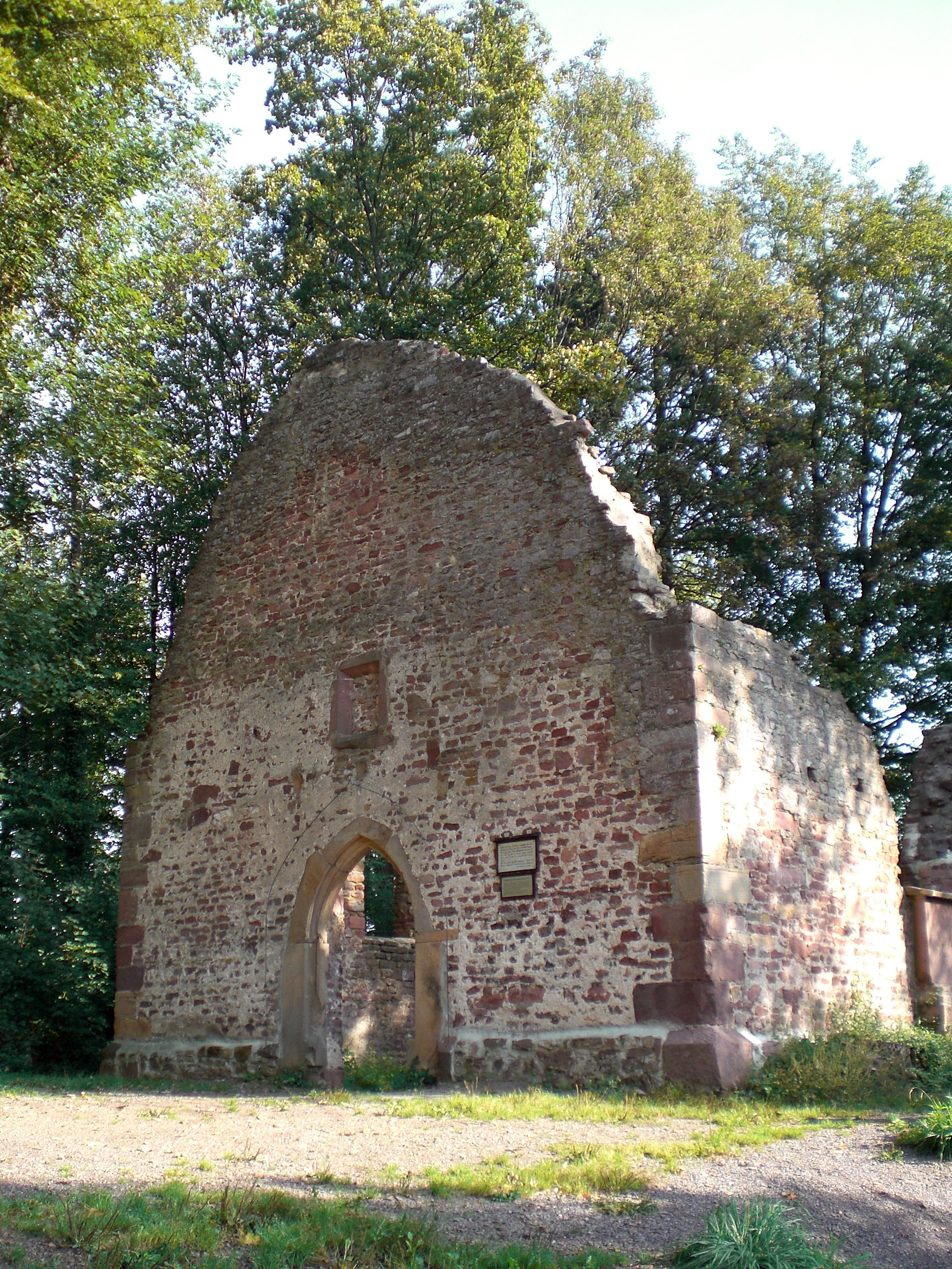 Ruine der St. Severins-Kapelle auf dem Mauracherberg. Vermutlich befand sich hier schon vor 1000 Jahren die erste Kirche Denzlingens. Die Ruine trägt die Jahreszahl 1497.